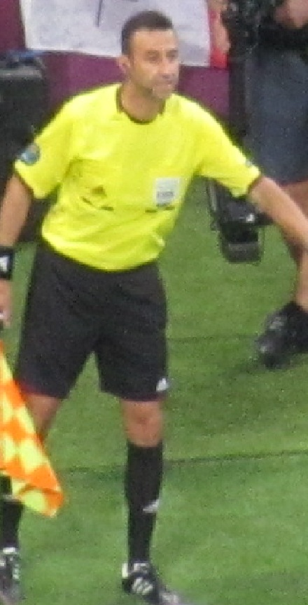 Боковой судья Ренато Фаверани